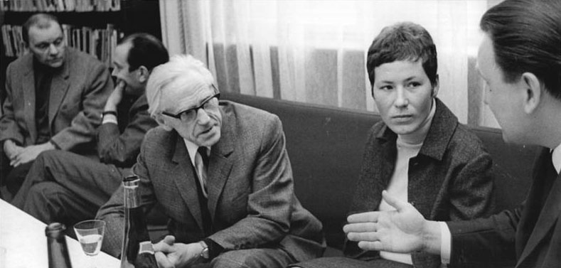 Factual corrections and alternative descriptions are encouraged separately from the original description. Additionally errors can be reported at this page to inform the Bundesarchiv. Original historic description: Berlin, Will-Lammert-Preis an M. Middell Zentralbild Franke 15.4.69 Berlin: Will-Lammert-Preis 1969 verliehen Der alle zwei Jahre an junge Bildhauer der DDR verliehene Will-Lammert-Preis für den künstlerischen Nachwuchs von der Deutschen Akademie der Künste zu Berlin, wurde am 15.4.69 an die Bildhauerin Magret Middell (2.v.r.) vergeben. Die ehemalige Schülerin von Prof. Drake (l.) ist mit ihren Werken besonders auf der VI.Deutschen Kunstausstellung hervorgetreten. Rechts: Gerhard Hallmann stellv. Abteilungsleiter der Abteilung Bildende Kunst der DAK zu Berlin. [Heinrich Drake, Magret Middell, Gerhard Hallmann] Abgebildete Personen: * Drake, Heinrich Prof.: Bildhauer, DDR